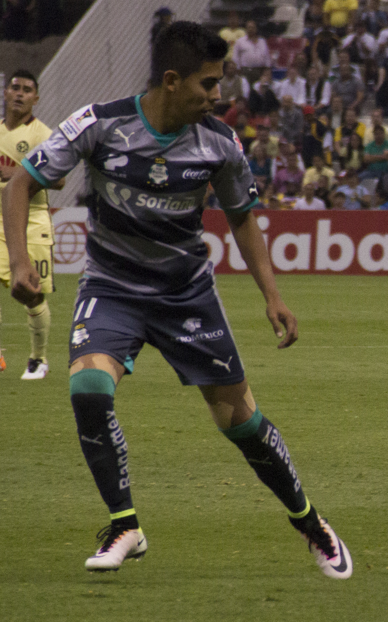 América vs Santos